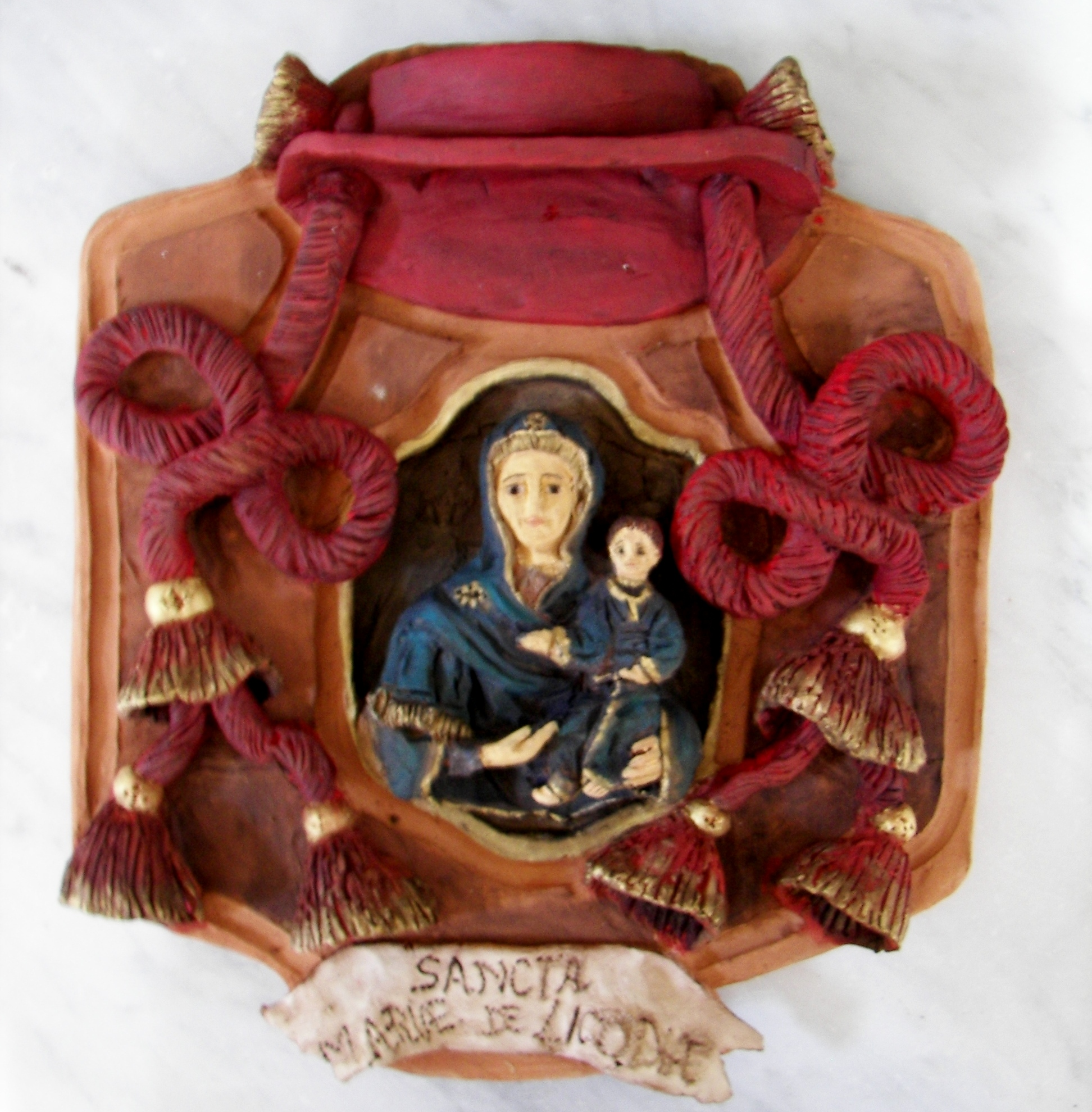 Stemma dell'Abbazia di Santa Maria di Licodia. Ricostruzione plastica di Riccardo Spoto anno 2006. Chiesa Madre di Santa Maria di Licodia.